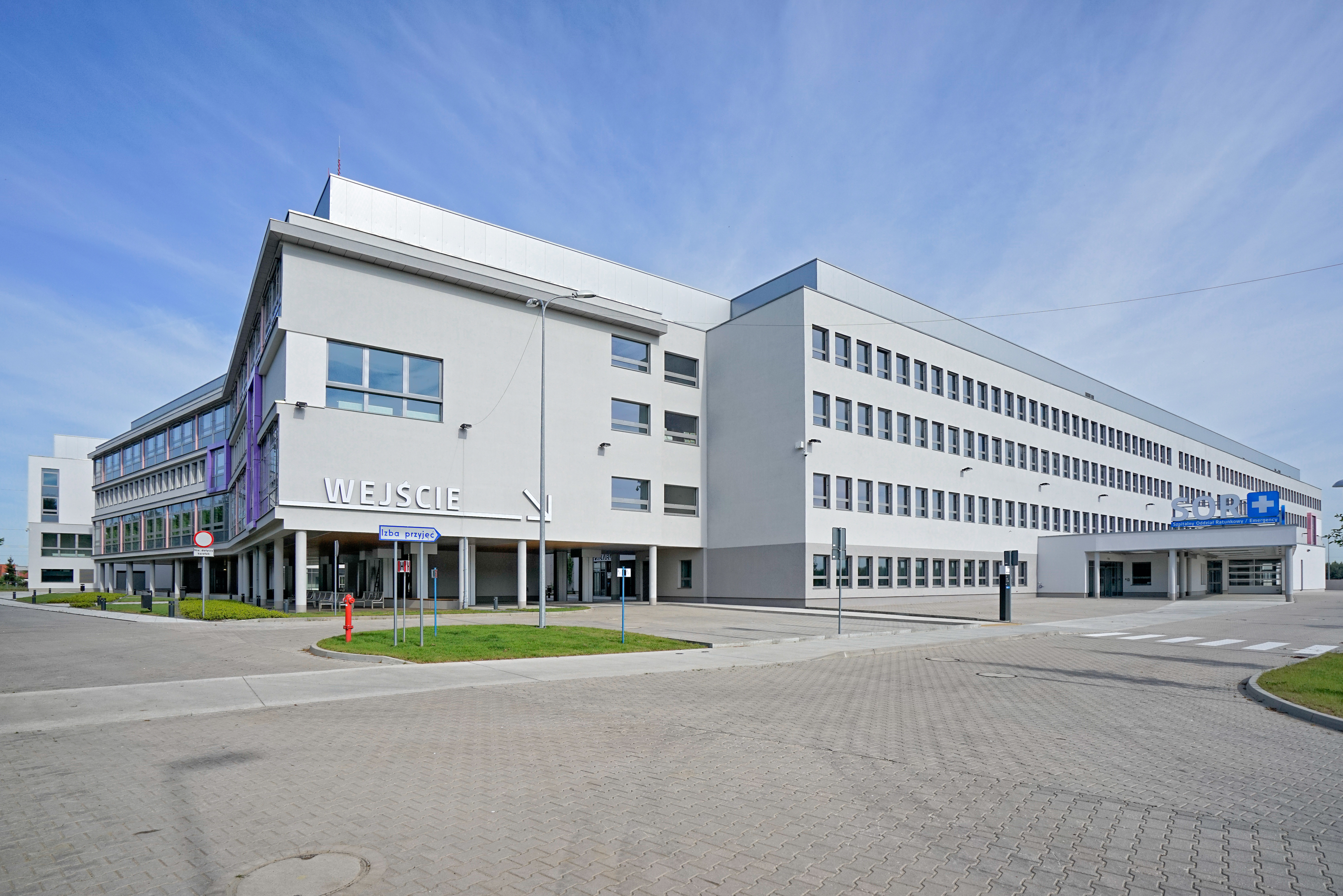 Nowa siedziba Dolnośląskiego Szpitala Specjalistycznego im. Tadeusza Marciniaka we Wrocławiu przy ulicy Generała Augusta Emila Fieldorfa 2